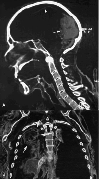 Esami sulla mummia di Cangrande della Scala